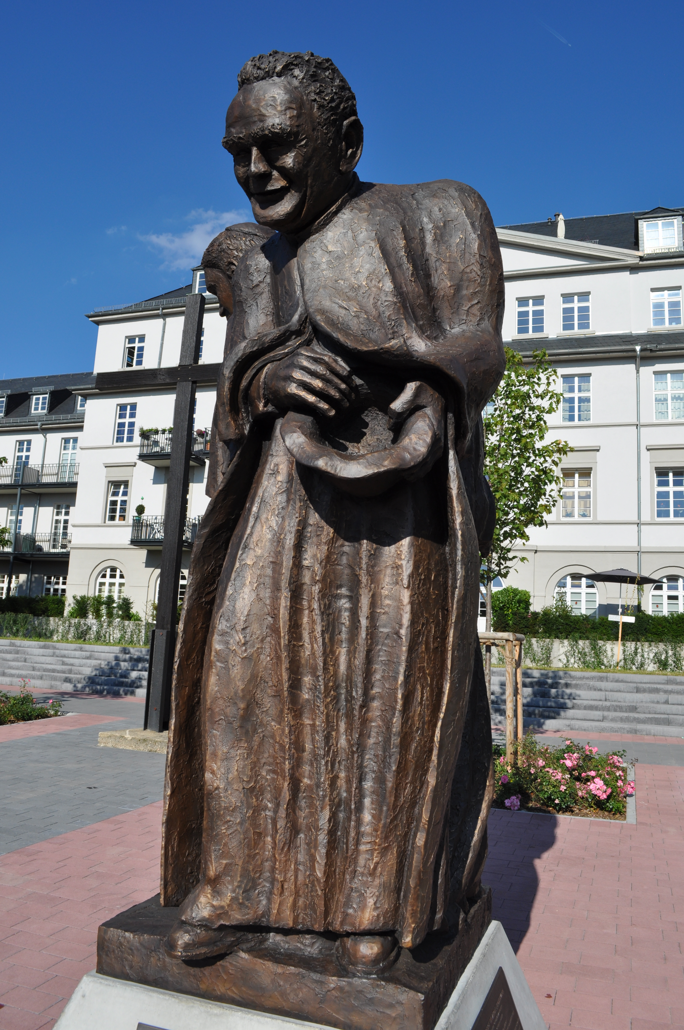 Denkmal für die Königsteiner Kirchenväter in Königstein im Taunus. Das Denkmal wurde von Christoph Loch entworfen und am 1. September 2011 eingeweiht. Das Bild zeigt die Figur von Pater Werenfried